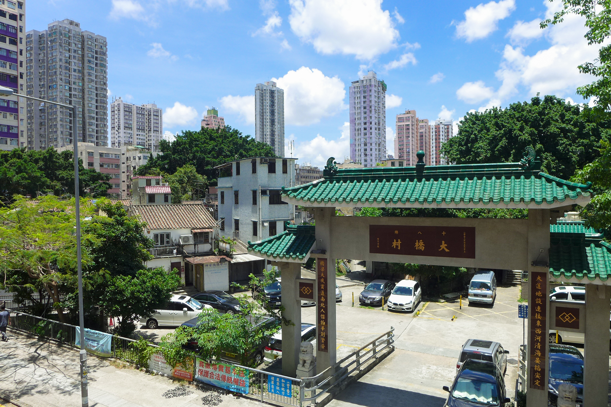 Tai Kiu Tsuen